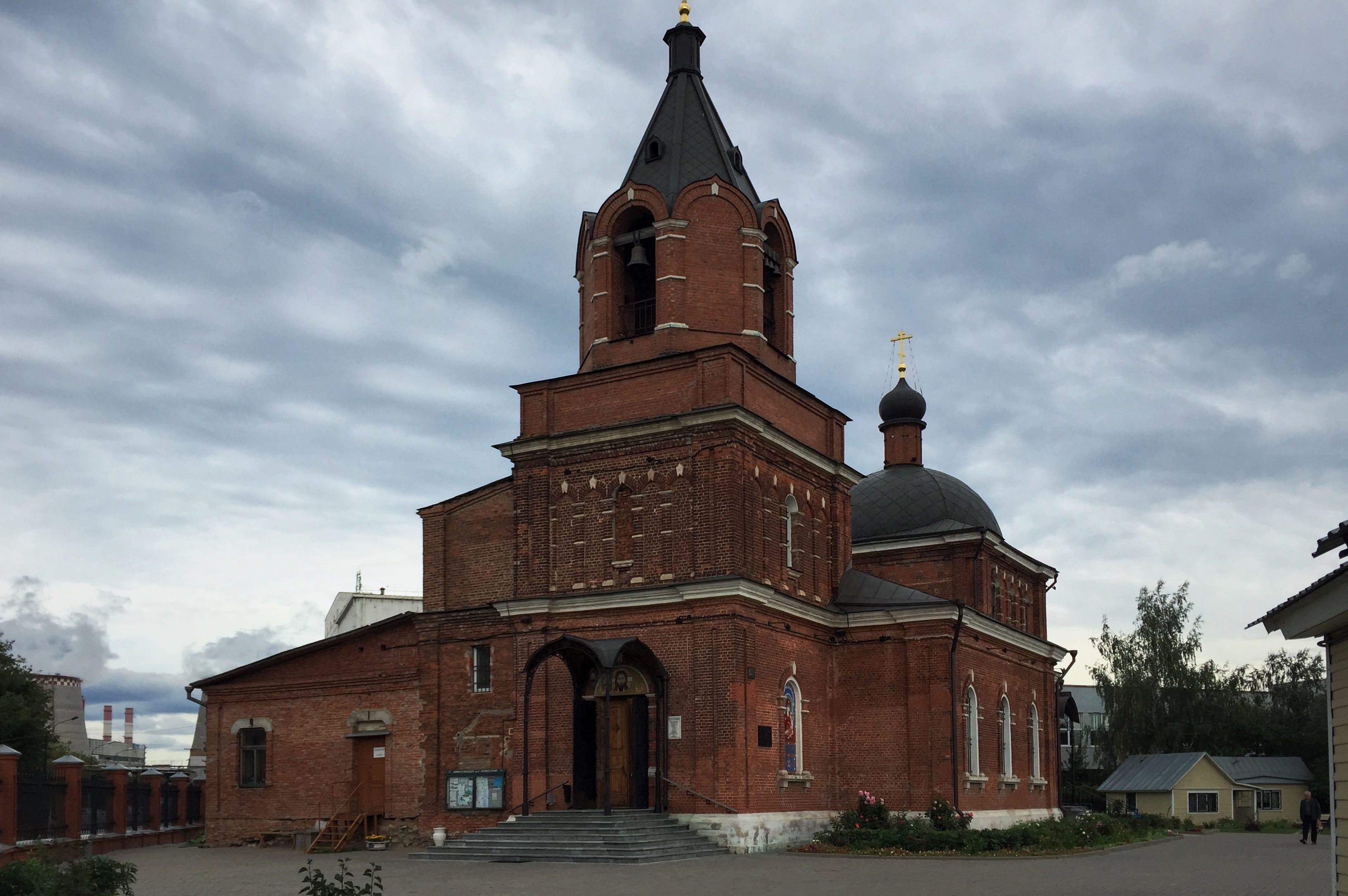 Ижорская улица. Храм Преподобного Сергия Радонежского в Бусиново Moscow in 2016; Москва в 2016